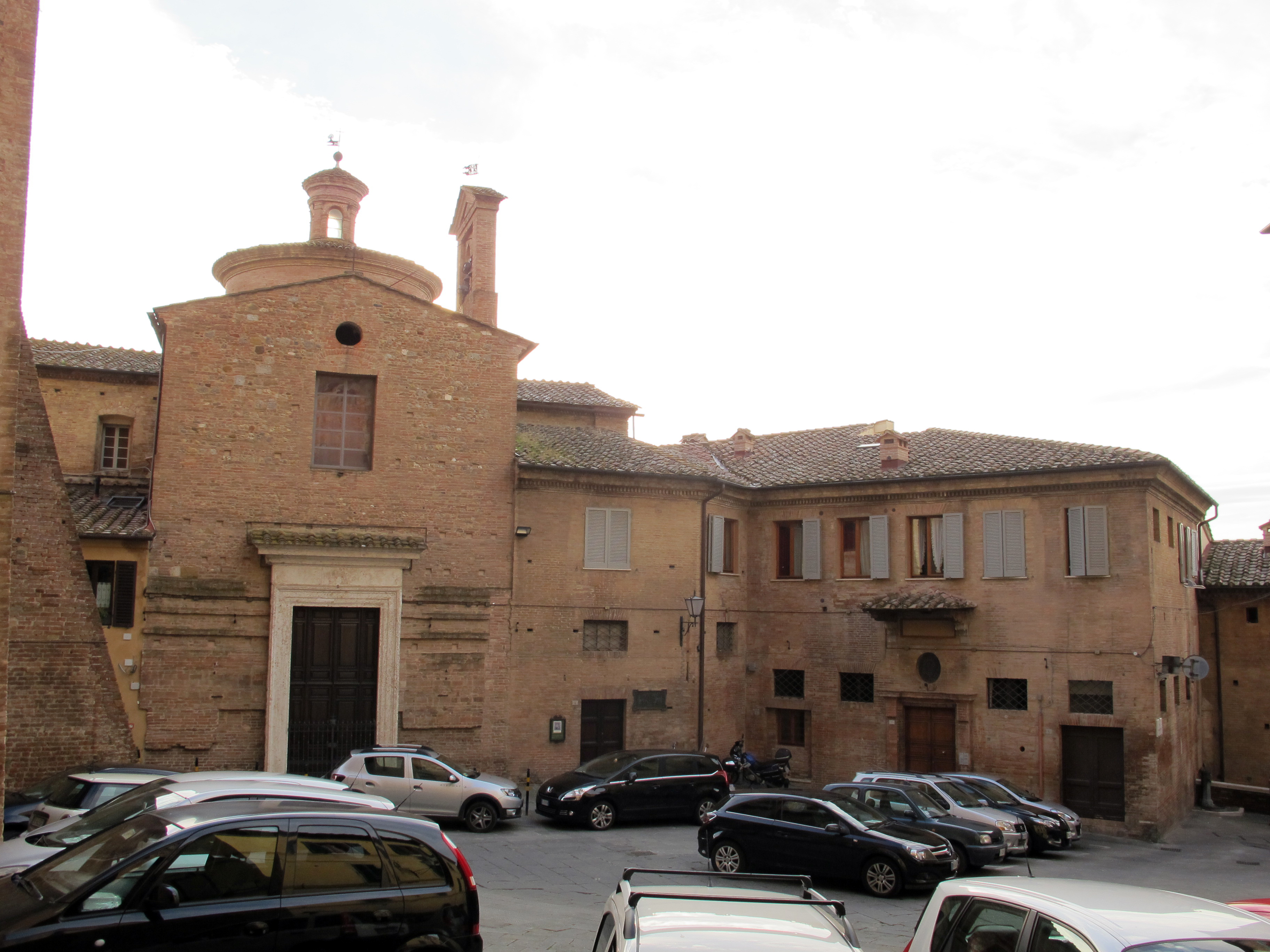 Siena